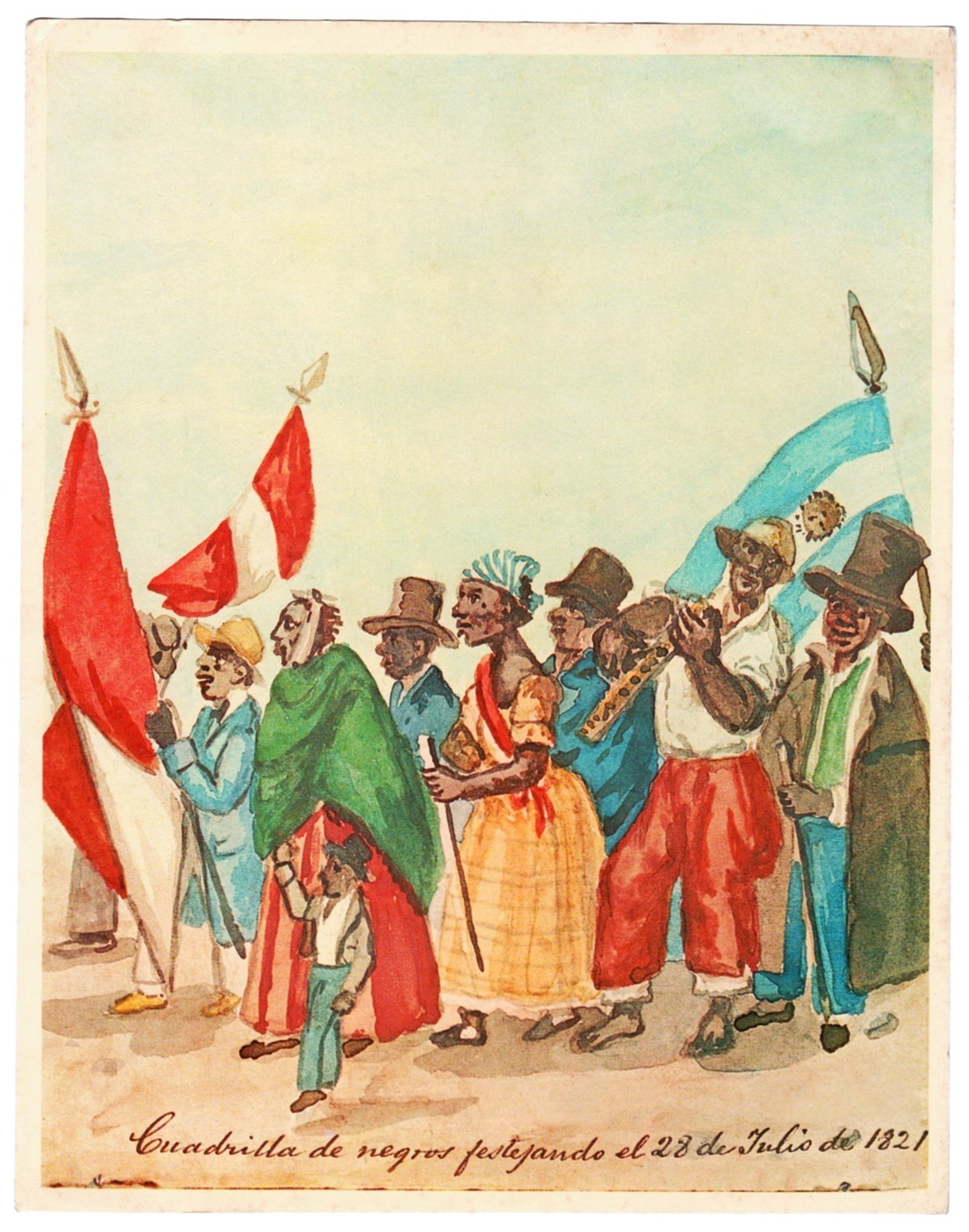 Acuarela de Pancho Fierro (Lima, 1807 - Lima, 1879)